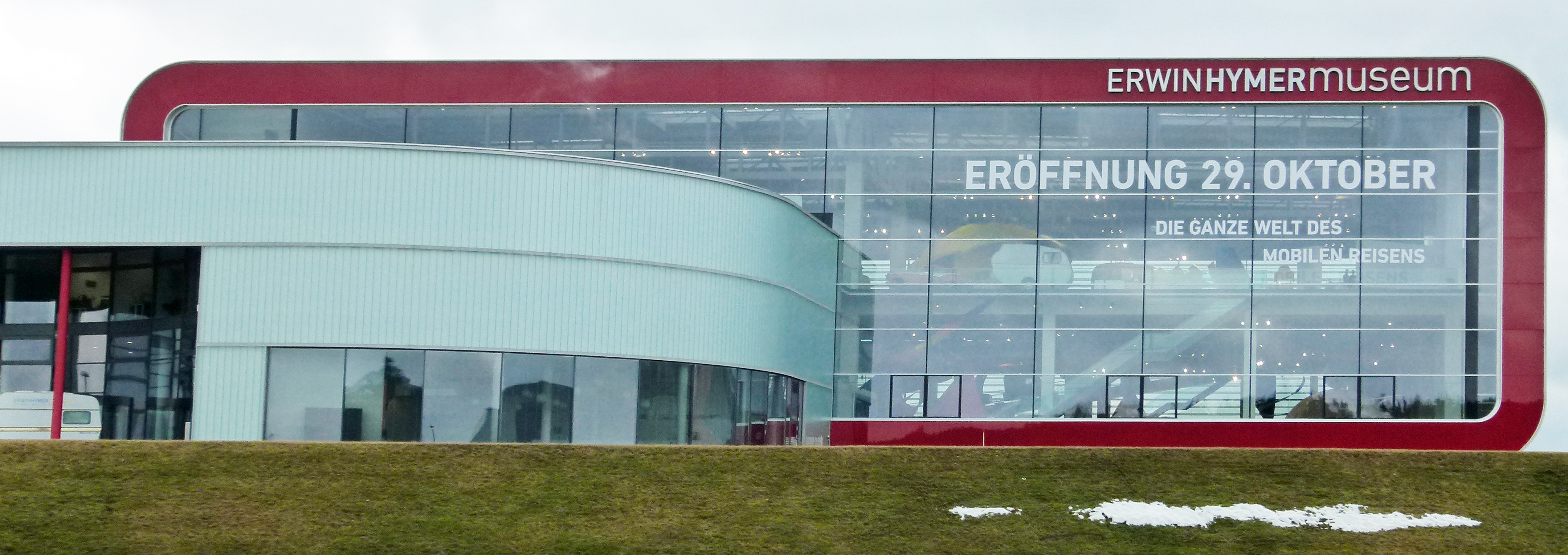 Bad Waldsee, Erwin Hymer Museum